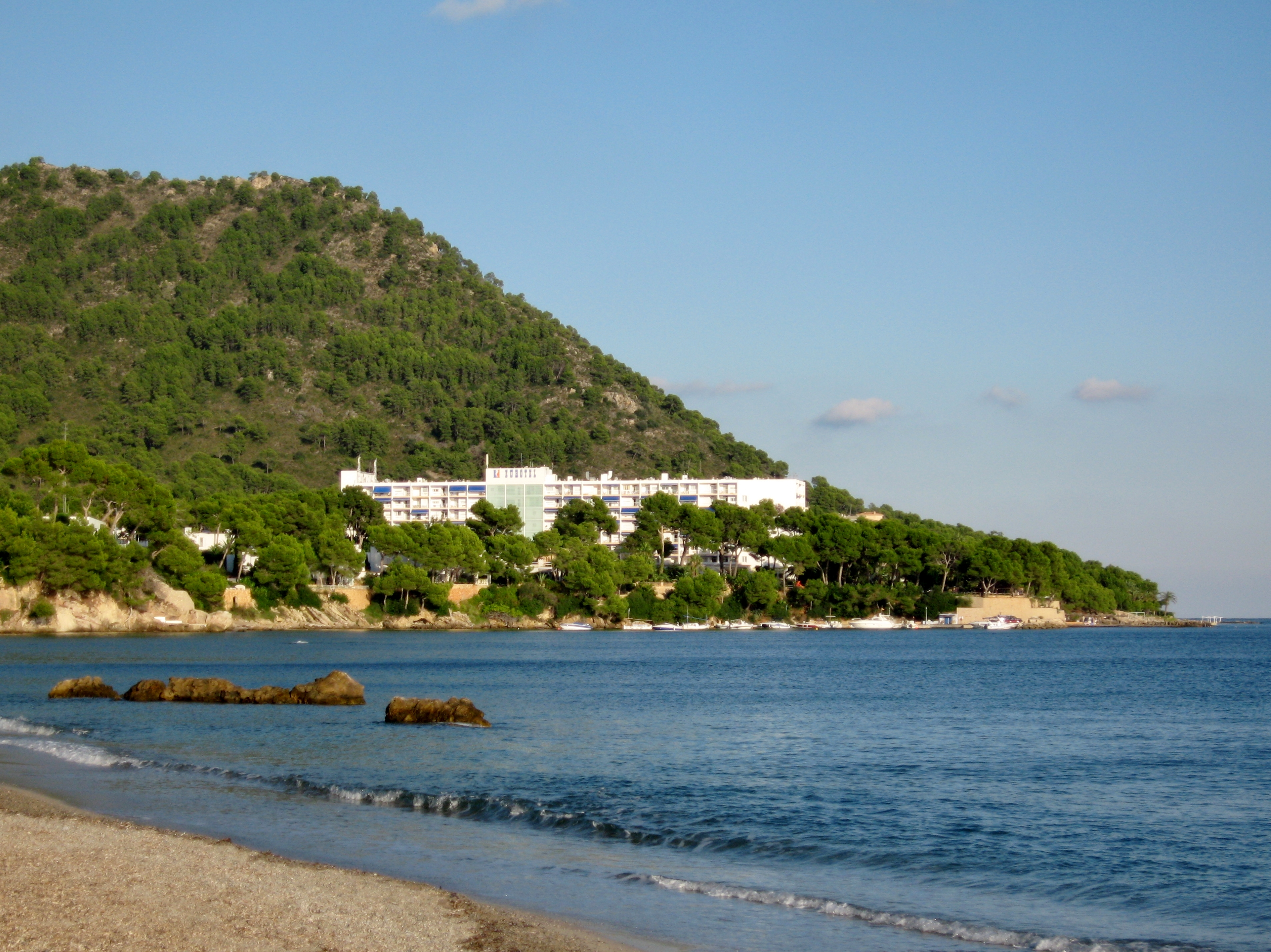 Costa des Pins (Costa dels Pins / Costa de los Pinos), Son Servera, Mallorca, Spain